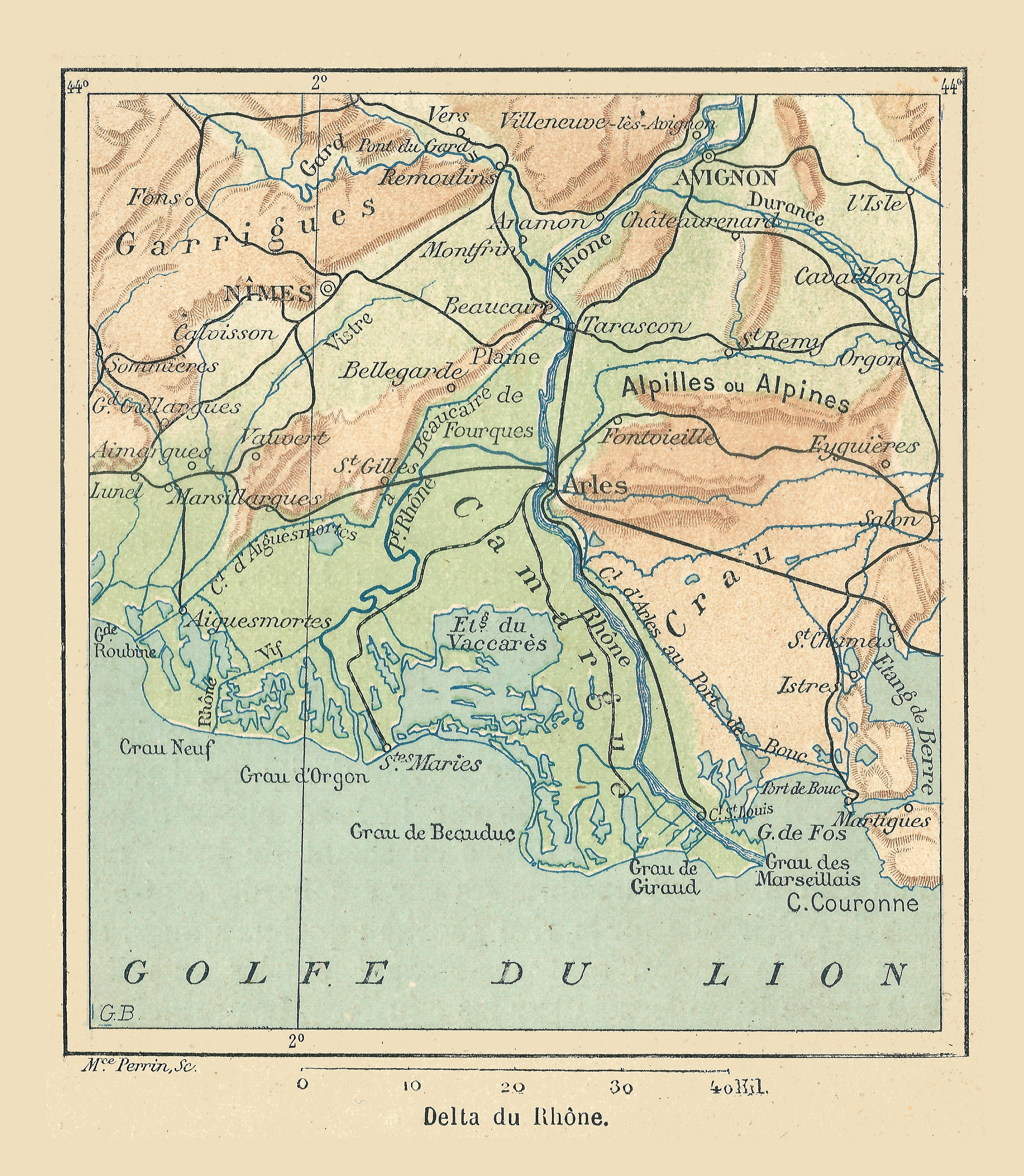 Carte de Franz Schrader